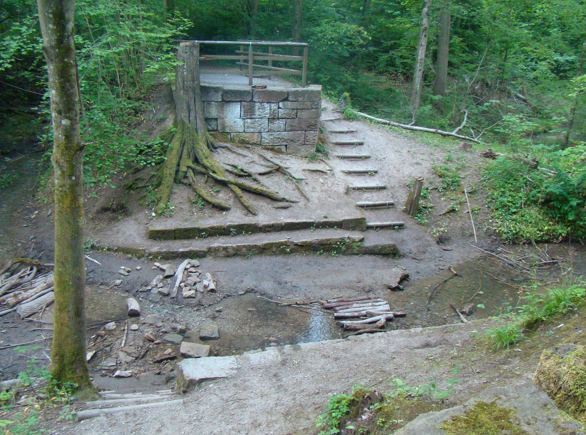 Köpfertal in Heilbronn